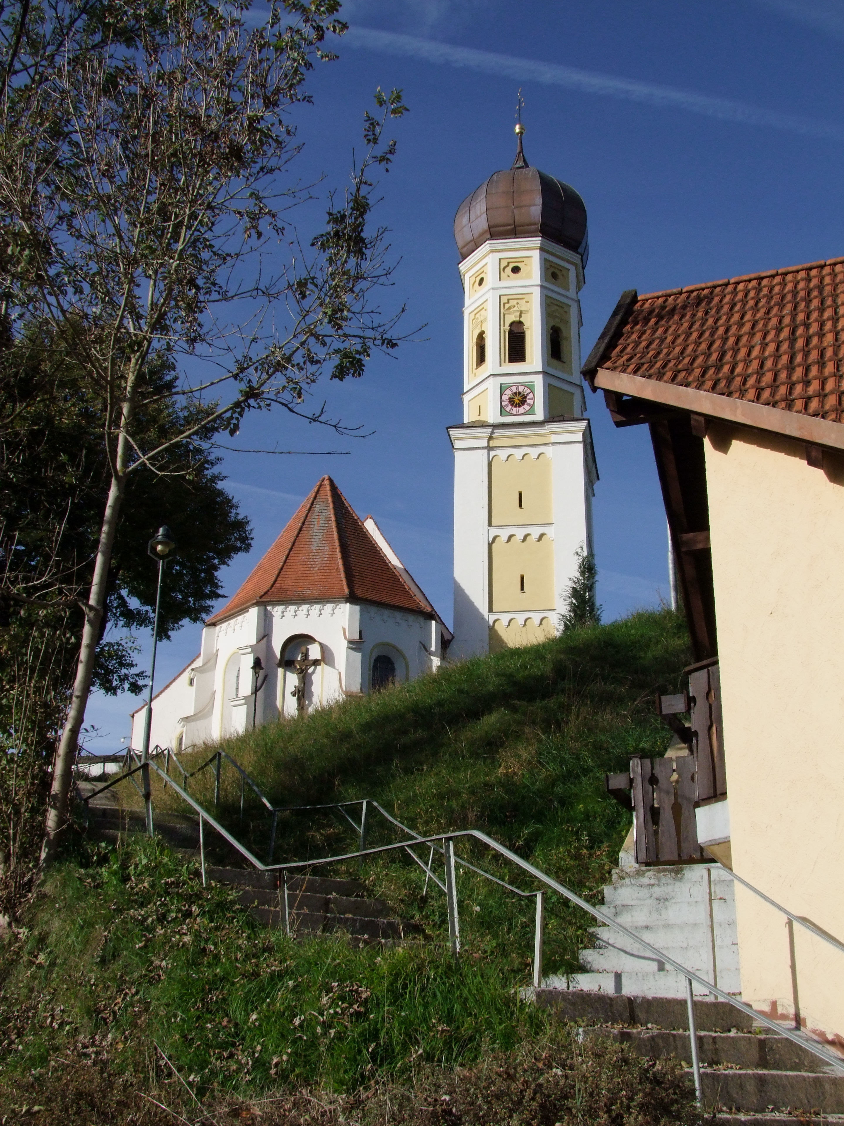 St. Georg im oberschwäbischen Lindenberg, Ortsteil der Stadt Buchloe in Bayerisch/Schwaben